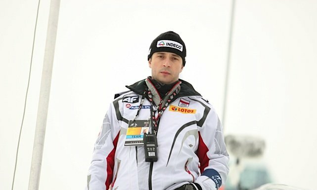 Łukasz Kruczek podczas konkursu drużynowego mężczyzn na skoczni normalnej podczas Mistrzostw Świata w Narciarstwie Klasycznym 2011 w Oslo.